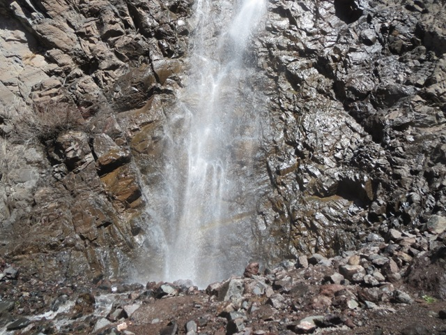 تصویر نزدیک از طبقه اول آبشار شله بن در روستای خسبان